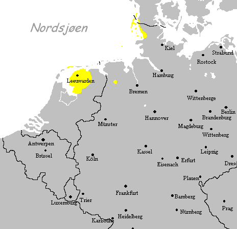 Kart over utbredelse av det frisiske språket.